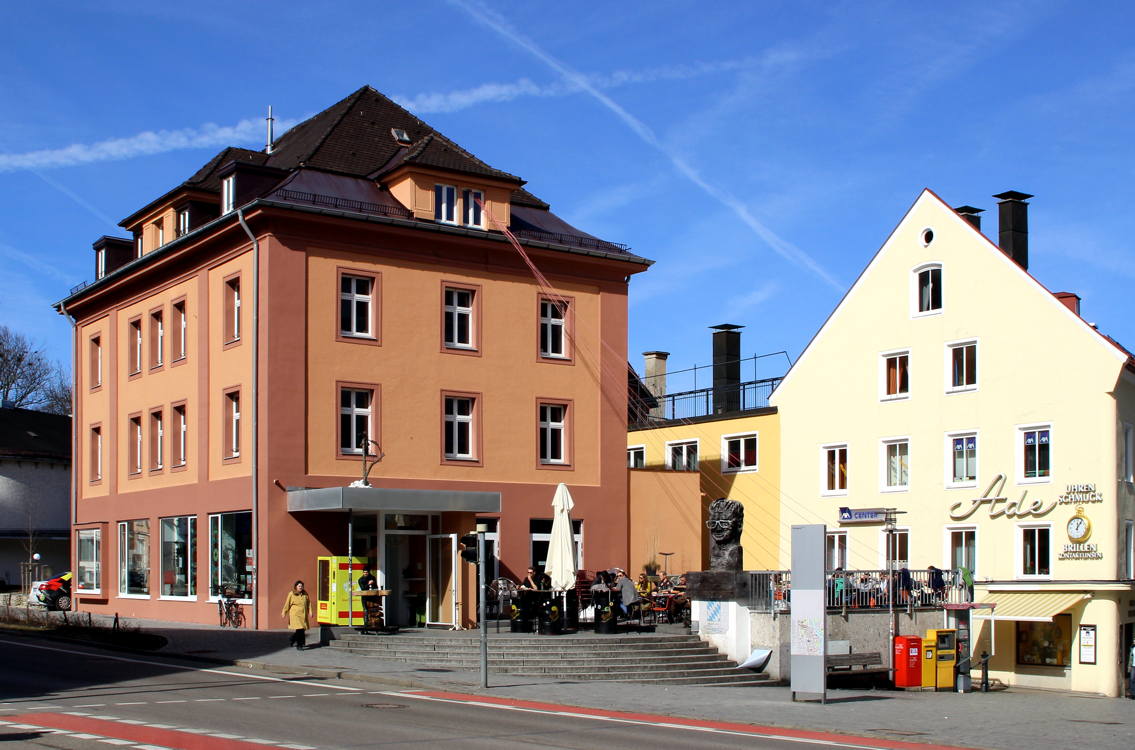 Künstlerhaus Kempten Nach Sanierungsmaßnahmen